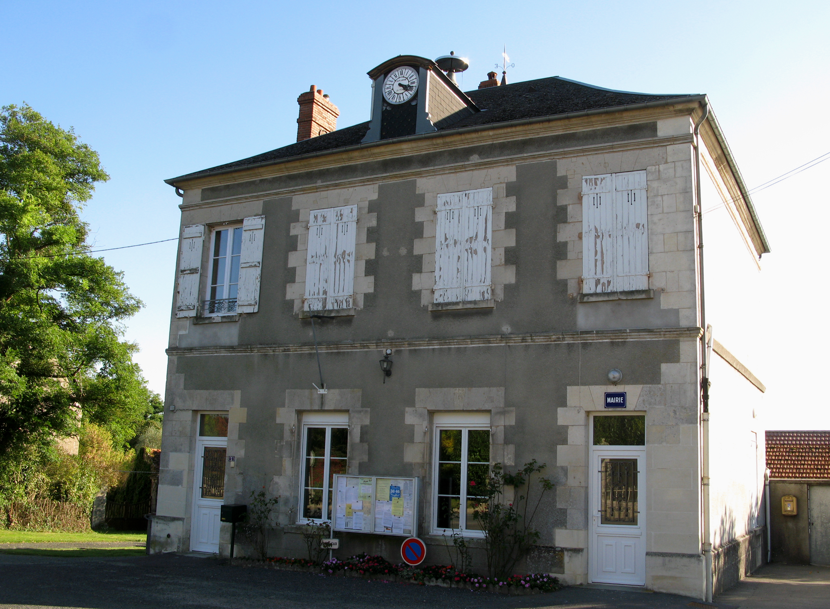 Cramaille (Aisne, France) - La mairie. . .